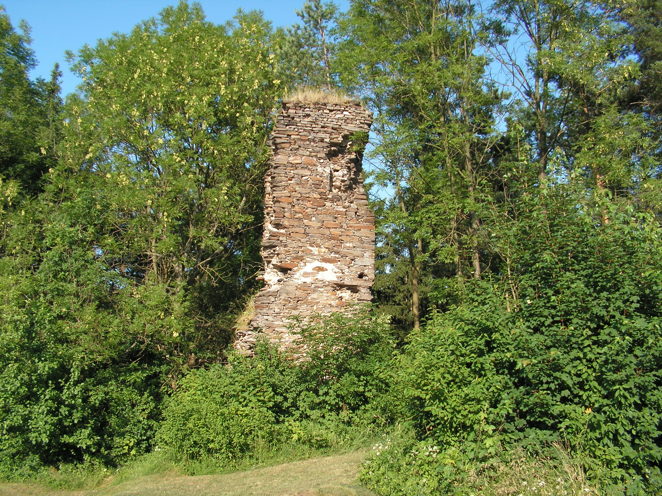 Zřícenina hradu Chlum ve stejnojmenné vsi v okrese Kutná Hora.